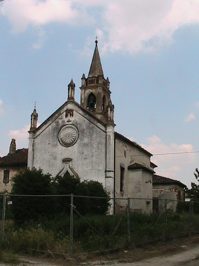 Cansero - Chiesa di San Michele